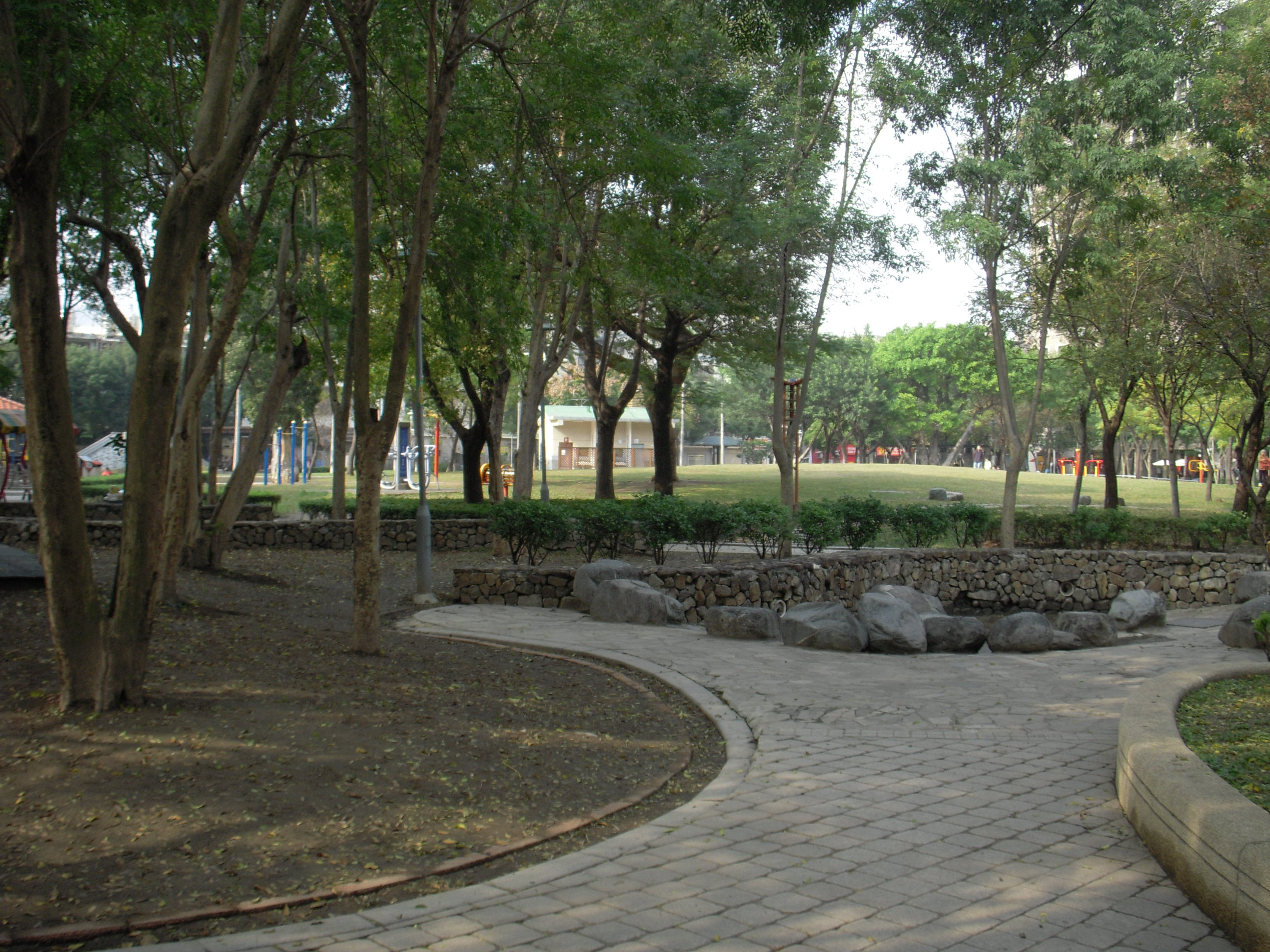 台鐵樹林後車站附近街景(長壽親子公園)